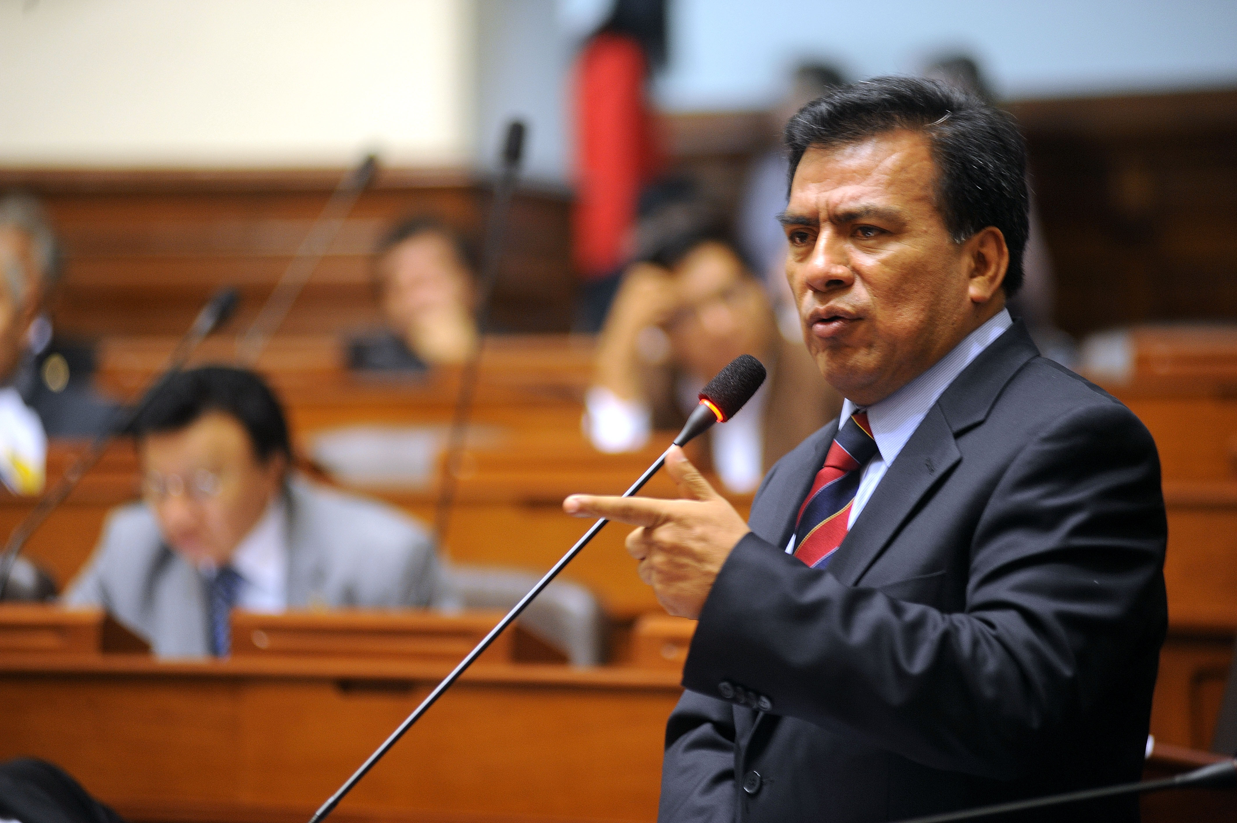 El legislador Javier Velásquez Quesquén durante su intervención en el debate parlamentario realizado esta mañana por el Pleno congresal.